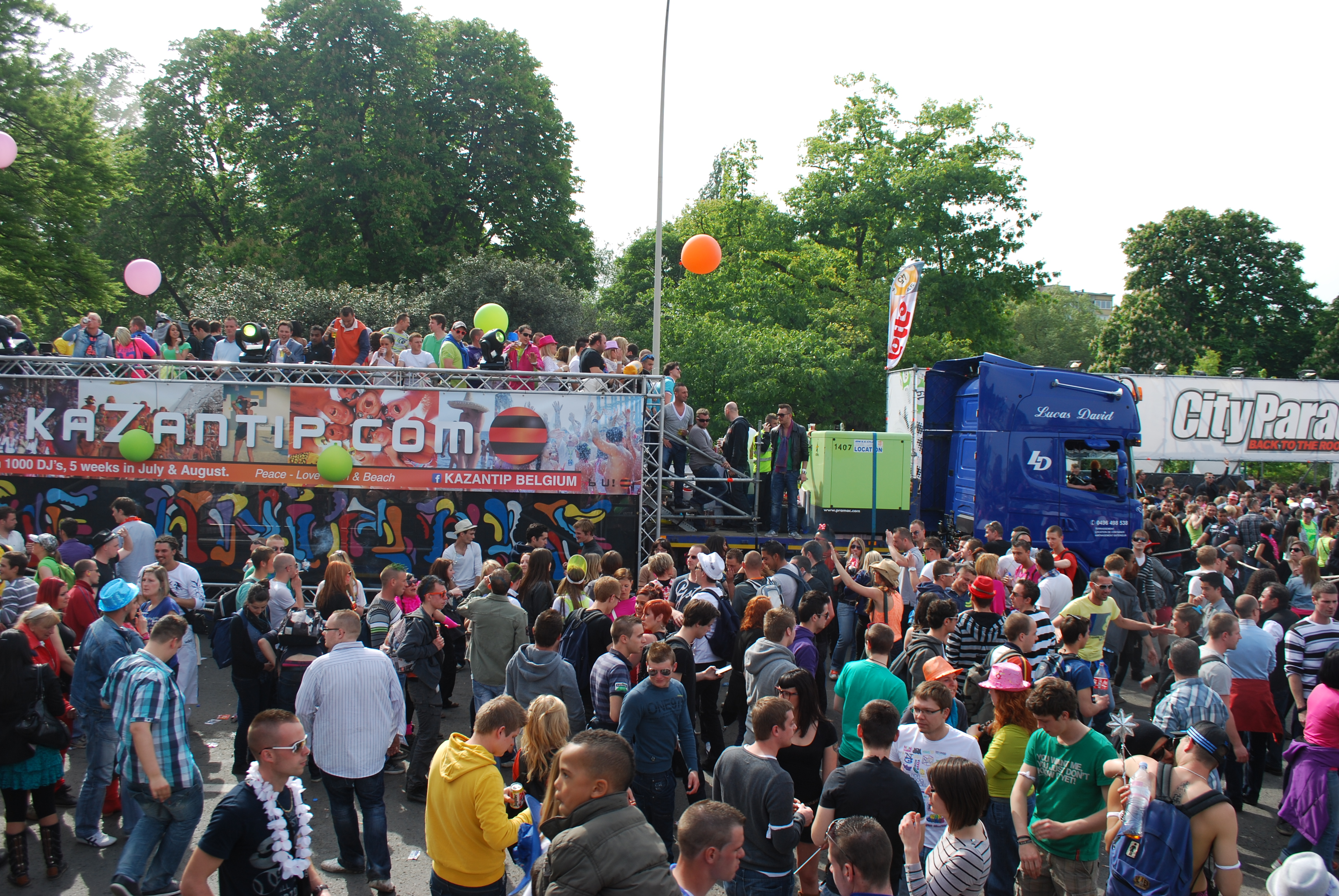 Vue de l'avenue Rogier à Liège, aux premières heures de la "City Parade Liège 2012".